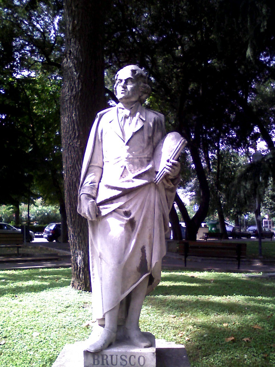 Statua del pittore Paolo Gerolamo Brusco ubicata nei giardini pubblici di Piazza del Popolo in Savona (Italy)